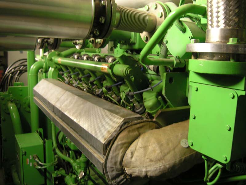 GE Jenbacher Biogasmotor Güssing 2006 eigene Aufnahme